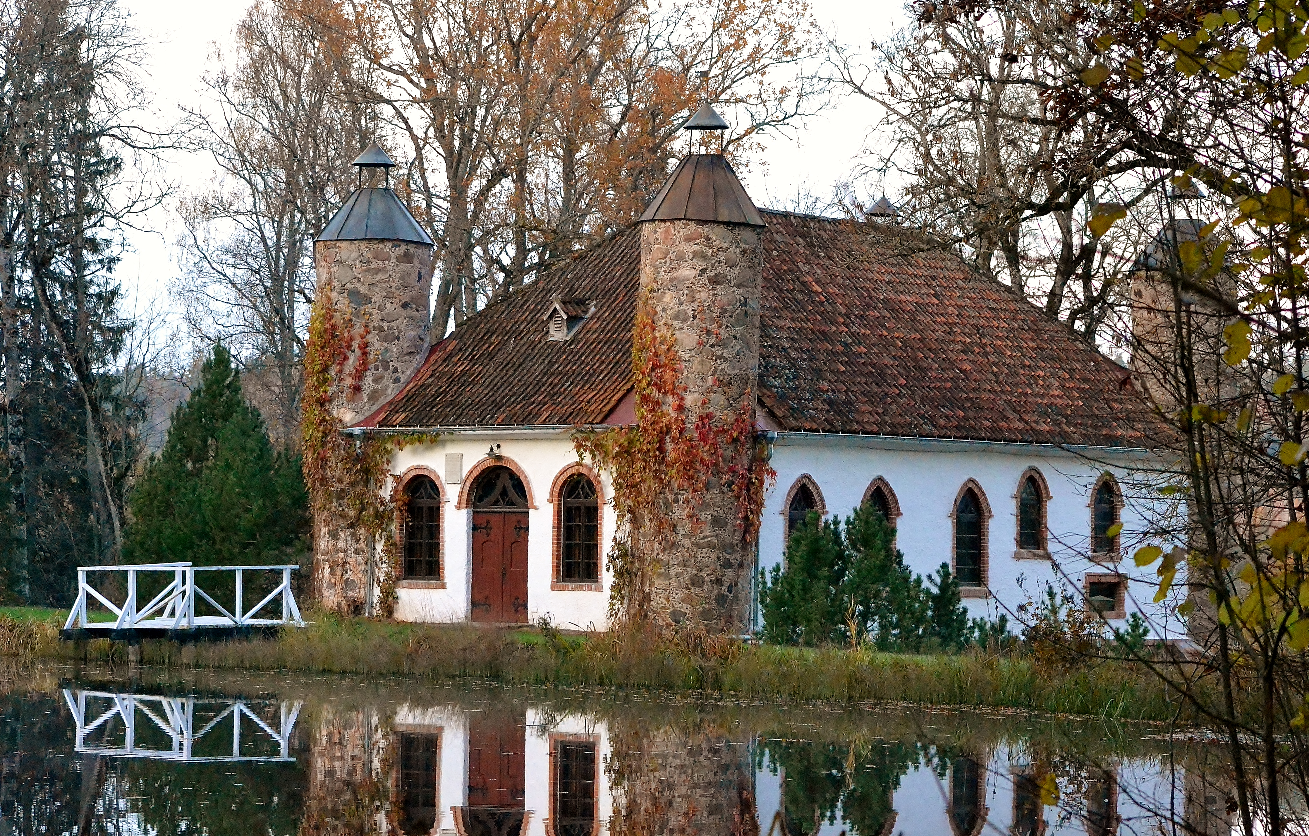 Viinaköök, Heimtali HK omanduses.